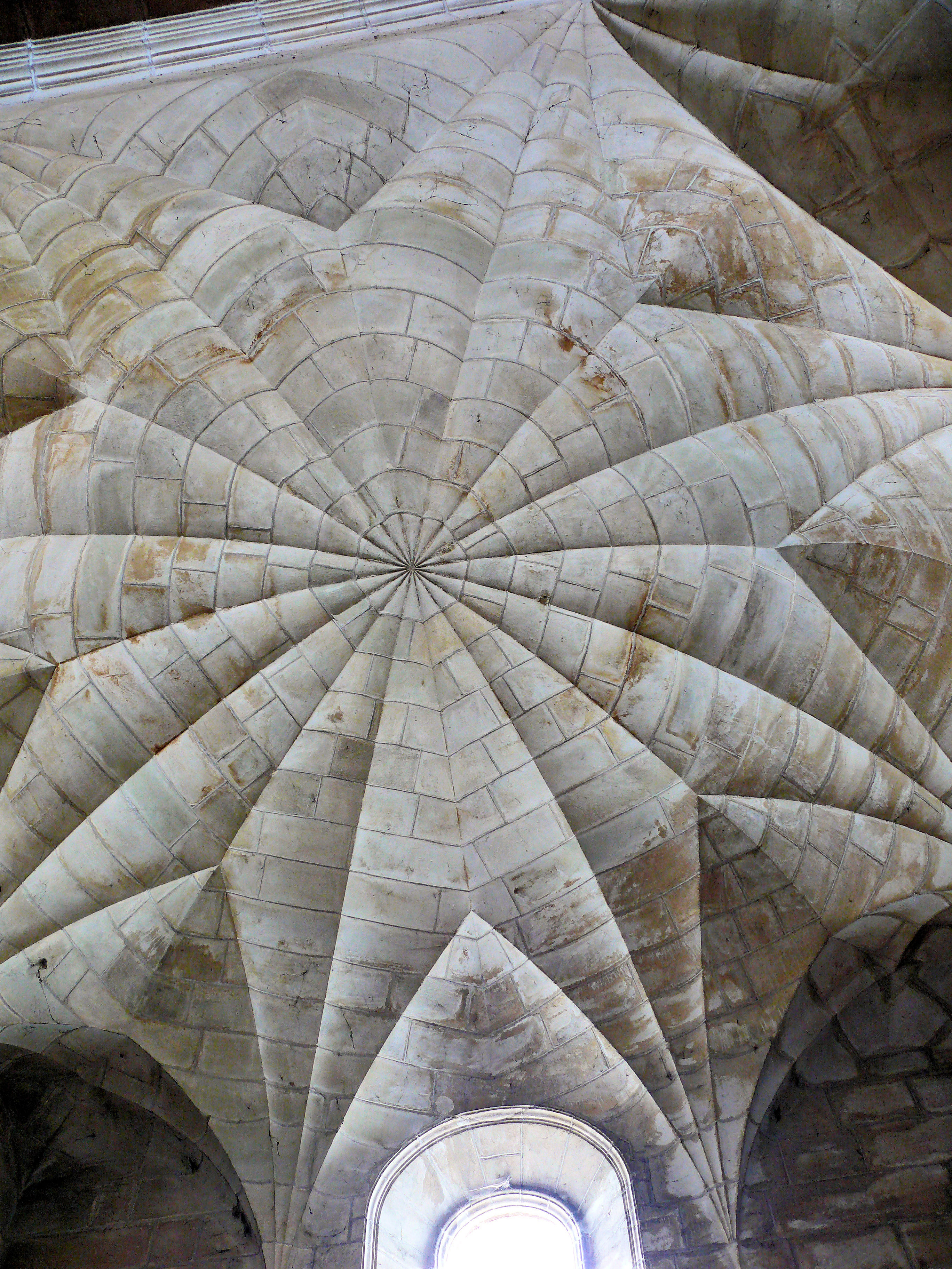 Assier - Chapelle funéraire de Galiot de Genouillac à l'église Saint-Pierre - Voûte en étoiles à 16 branches